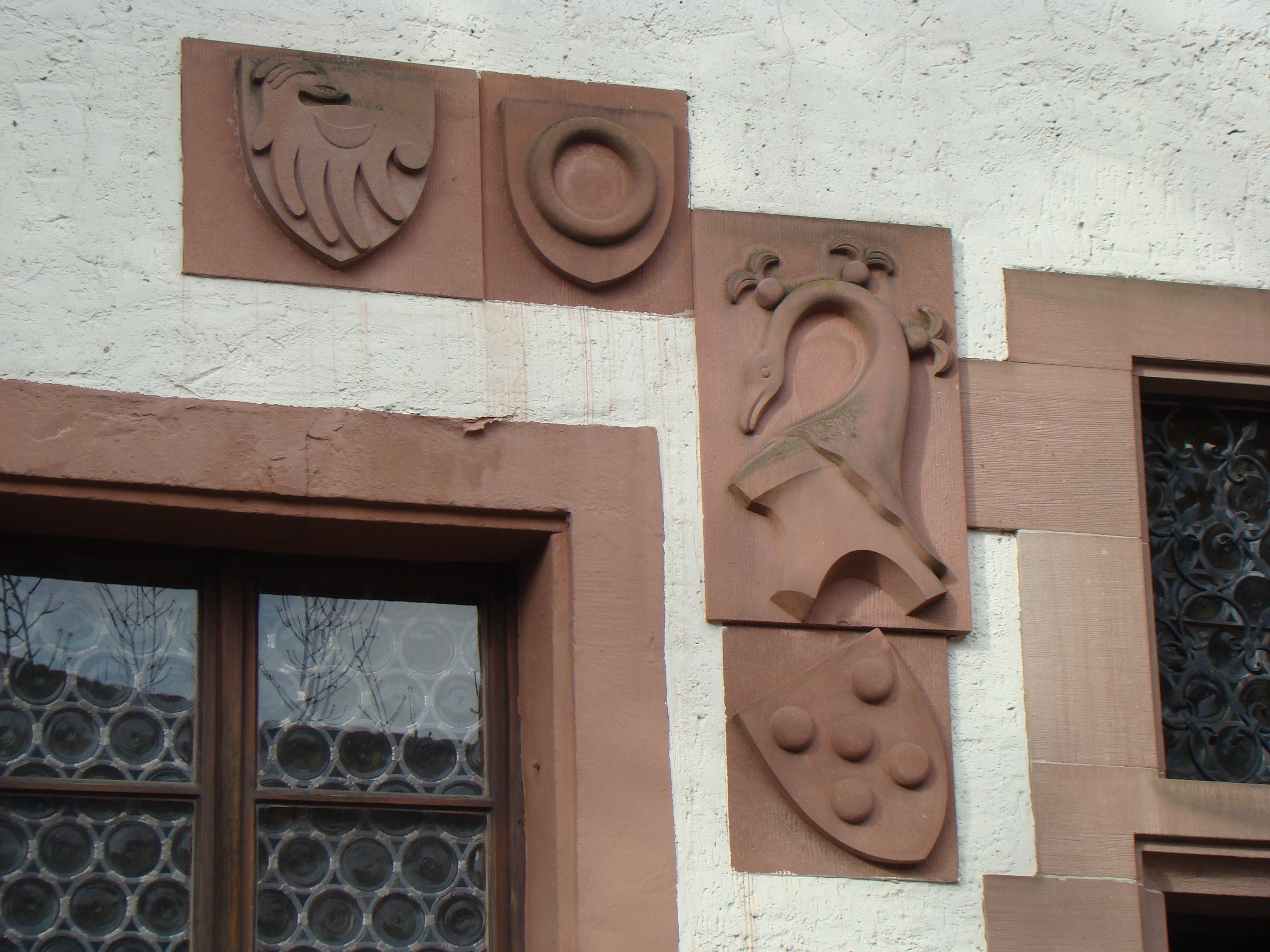 Freihof in Wiesloch, Wappensteine